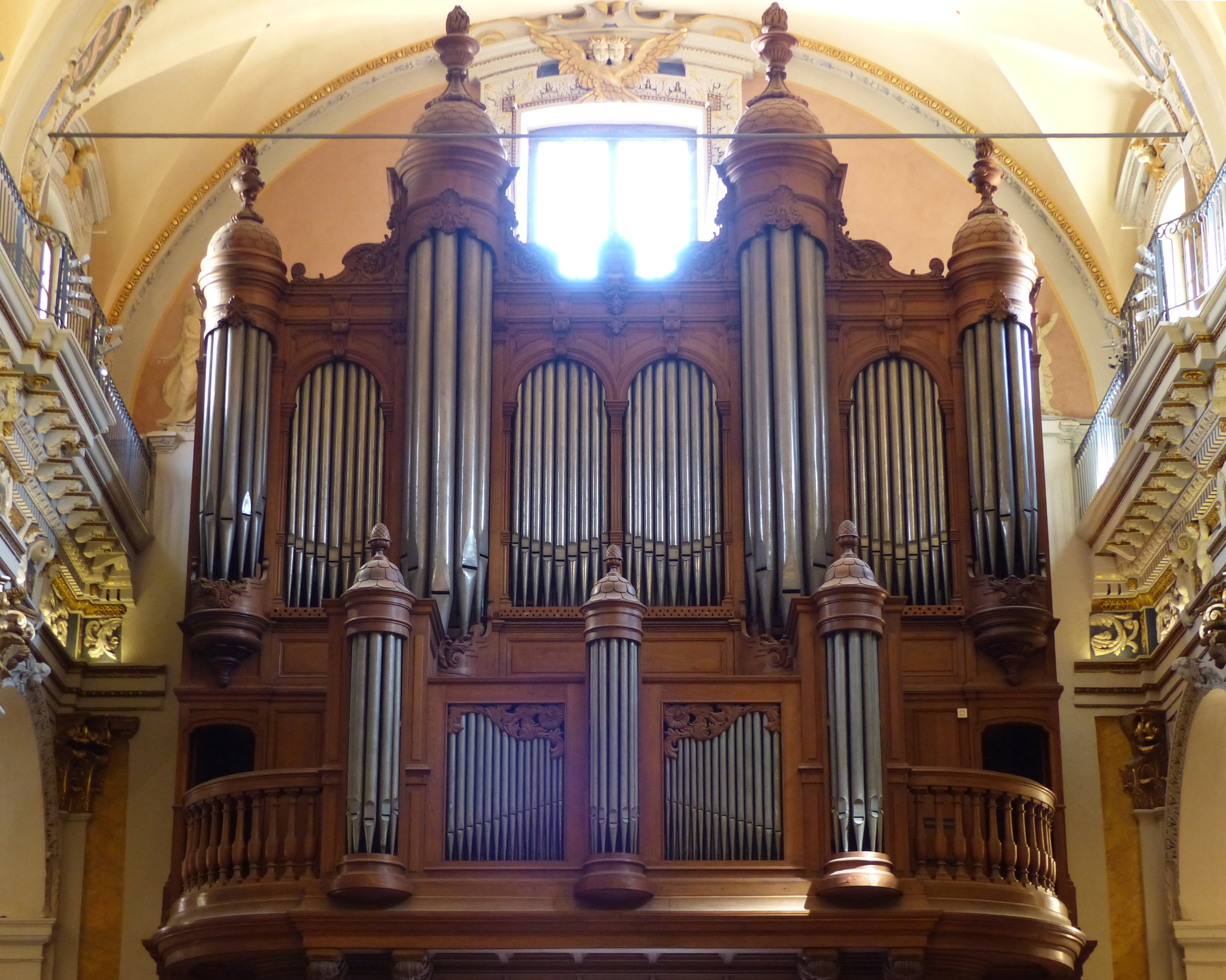 Nice (Alpes-Maritimes, France), cathédrale Ste Réparate, orgue dont la restauration semble toucher à sa fin, mais les tuyaux de chamade sont encore absents pour l'instant.